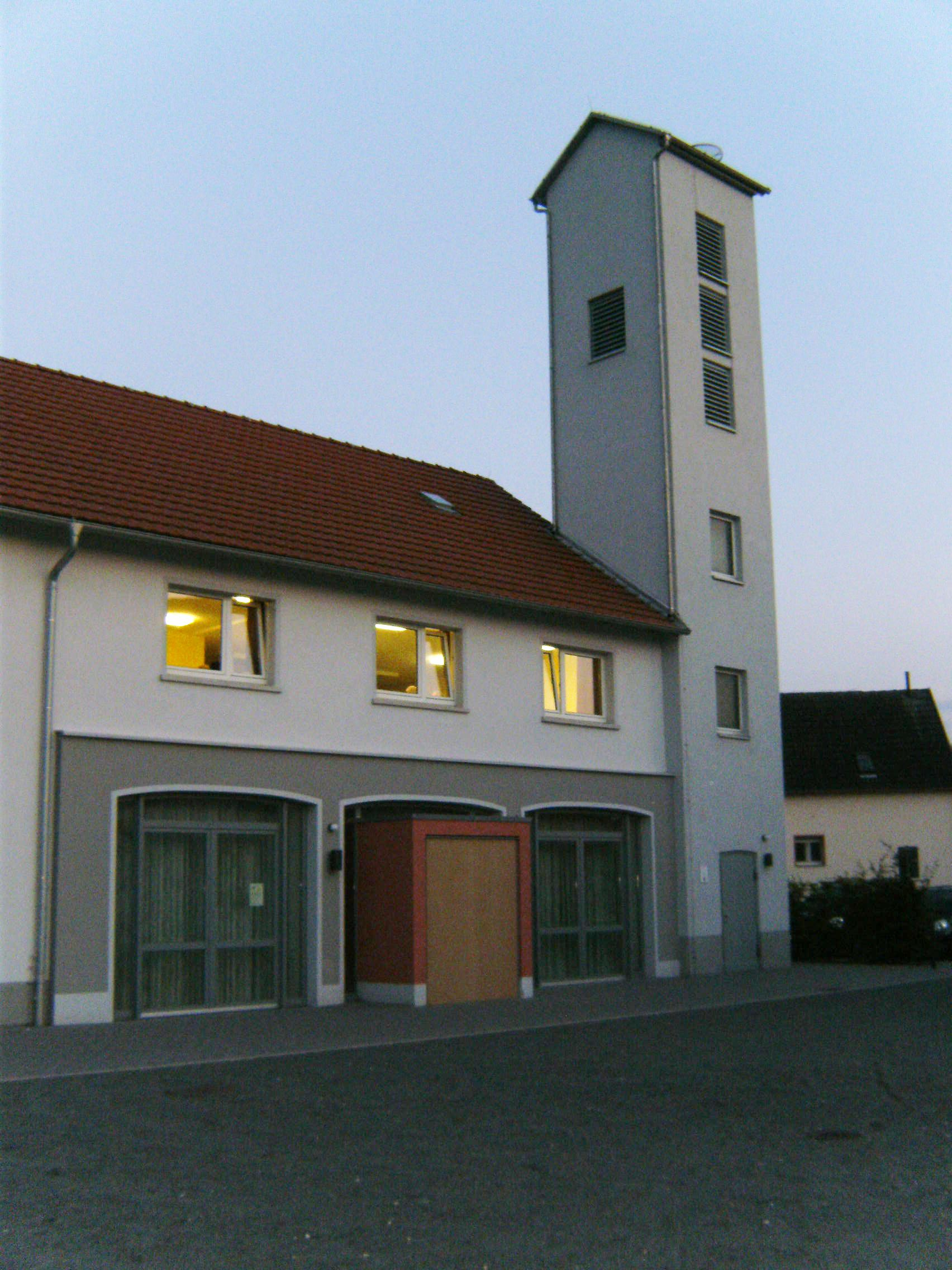 hi whatz up